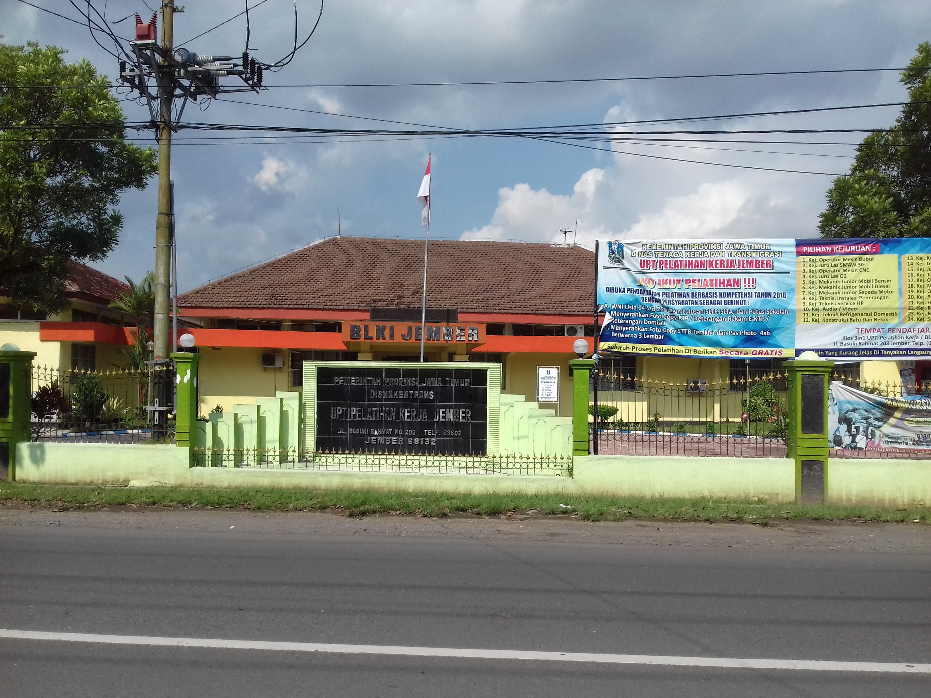 Tampak depan Balai Latihan Kerja Jember